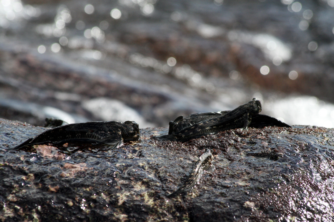 Istiblennius sp. Poisson sur un rocher à Hanavave ( Fatu Hiva )